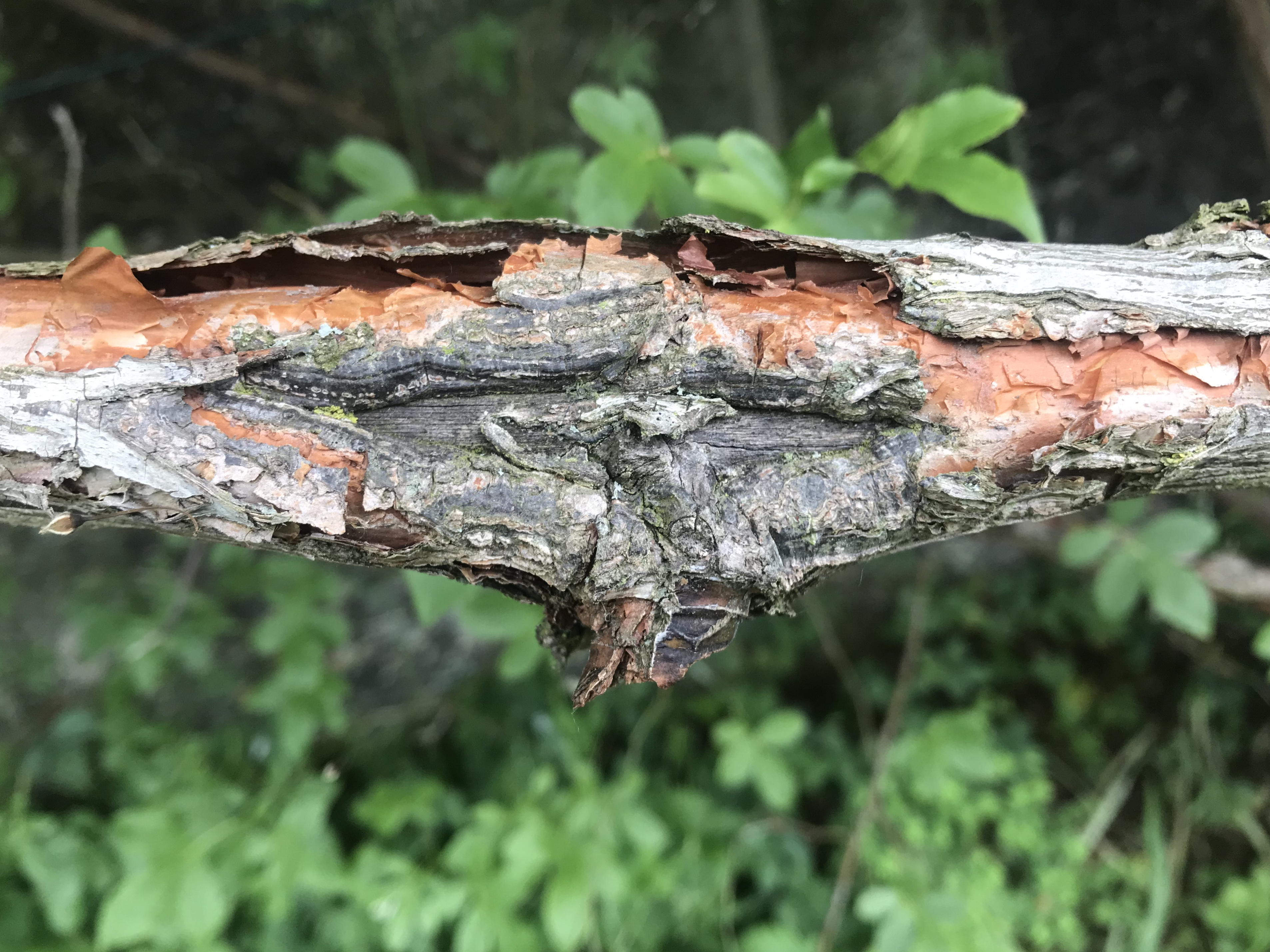 Nota: la corteccia nei rami vecchi di Rosa banksiae Lutea si sfalda longitudinalmente